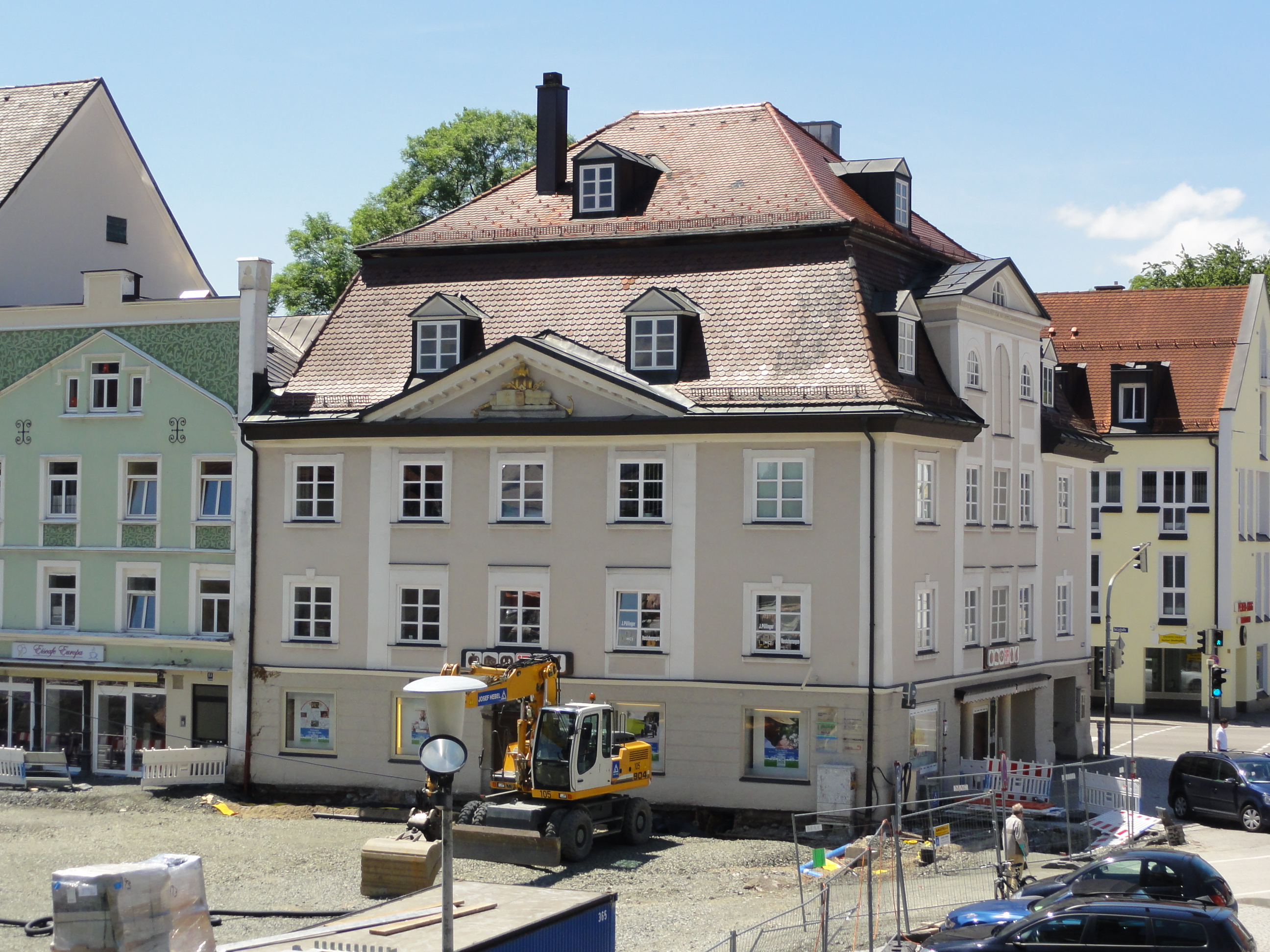 Kempten (Allgäu), Hildegardplatz 13